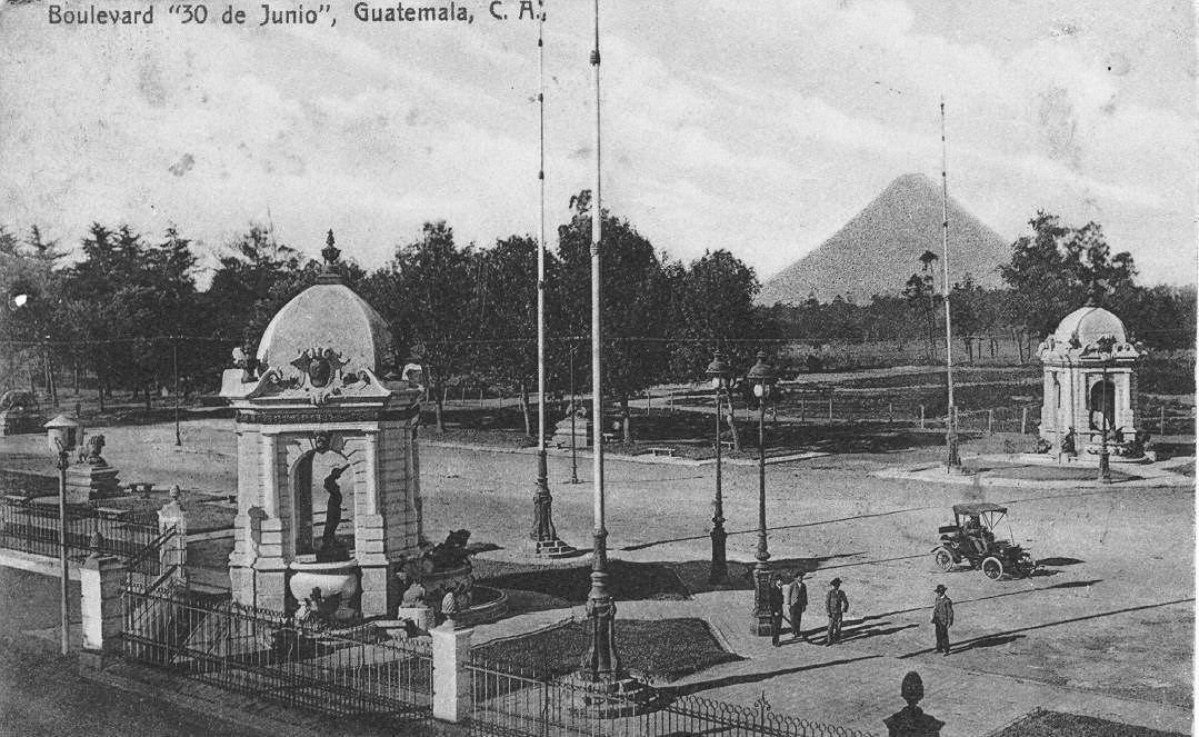 Boulevar30junio2